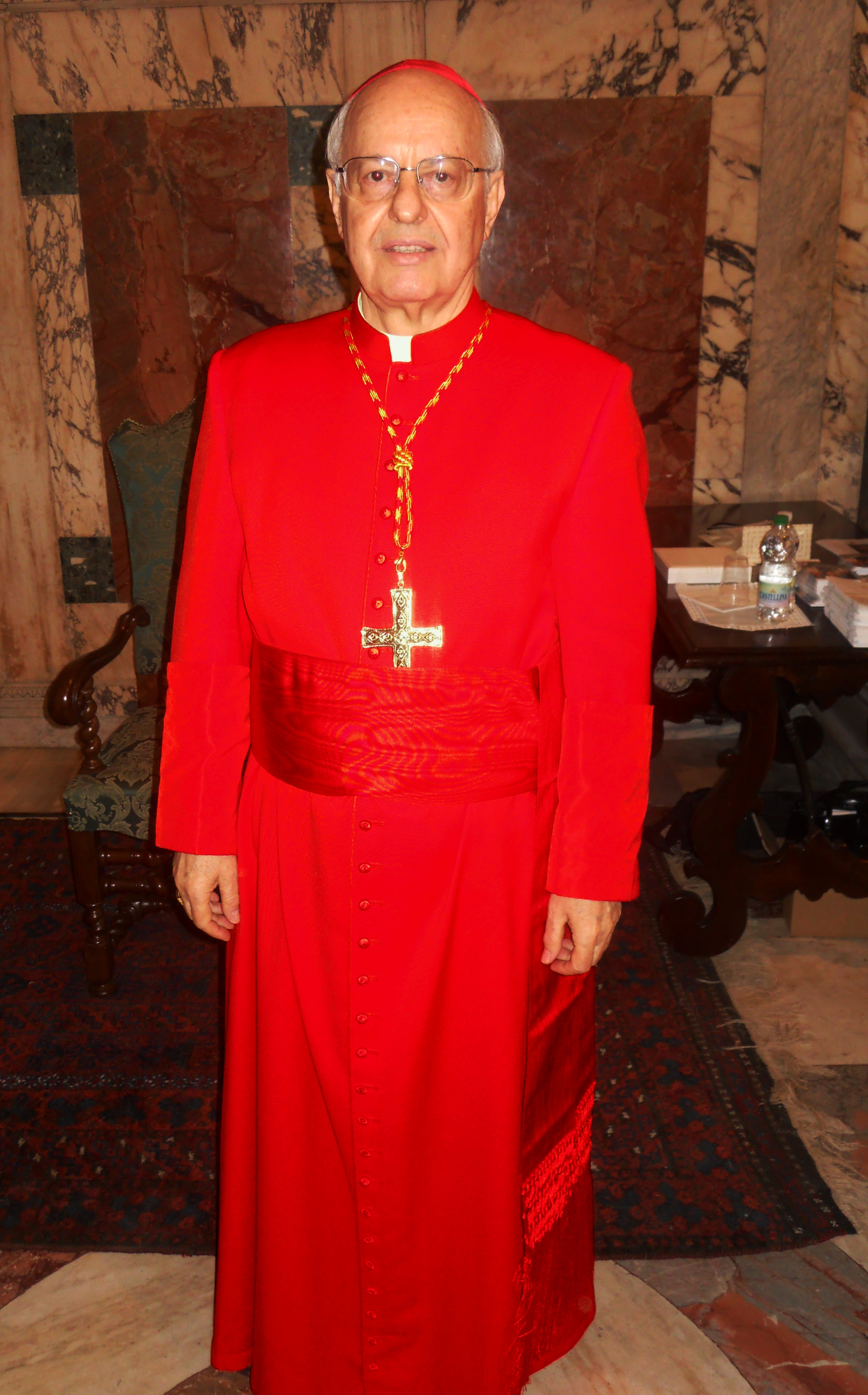 Lorenzo Cardinal Baldisseri